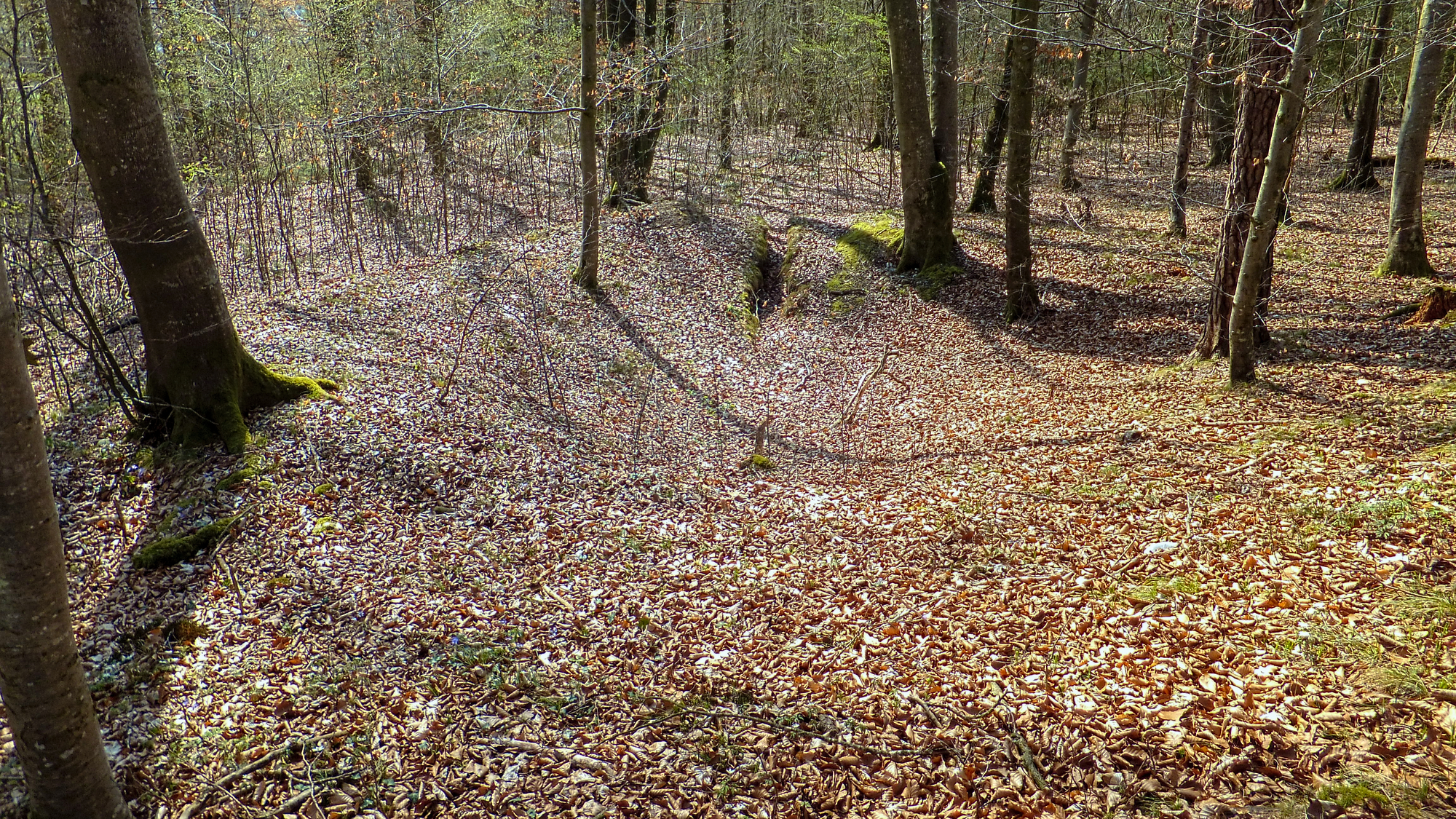 Bodensenke #004 alias Depression Alz (Bavarskiy). Blick von der Hangkante im NW nach SO, zum 2008 angelegten Sondierschnitt. Nach CIRT handelt es sich um einen Einschlagskrater des Chiemgau-Impaktes. Die in der Datenbank EDEIS angegebenen Koordinaten sind falsch. Das Objekt befindet sich auf 48.21267N 12.7706E.